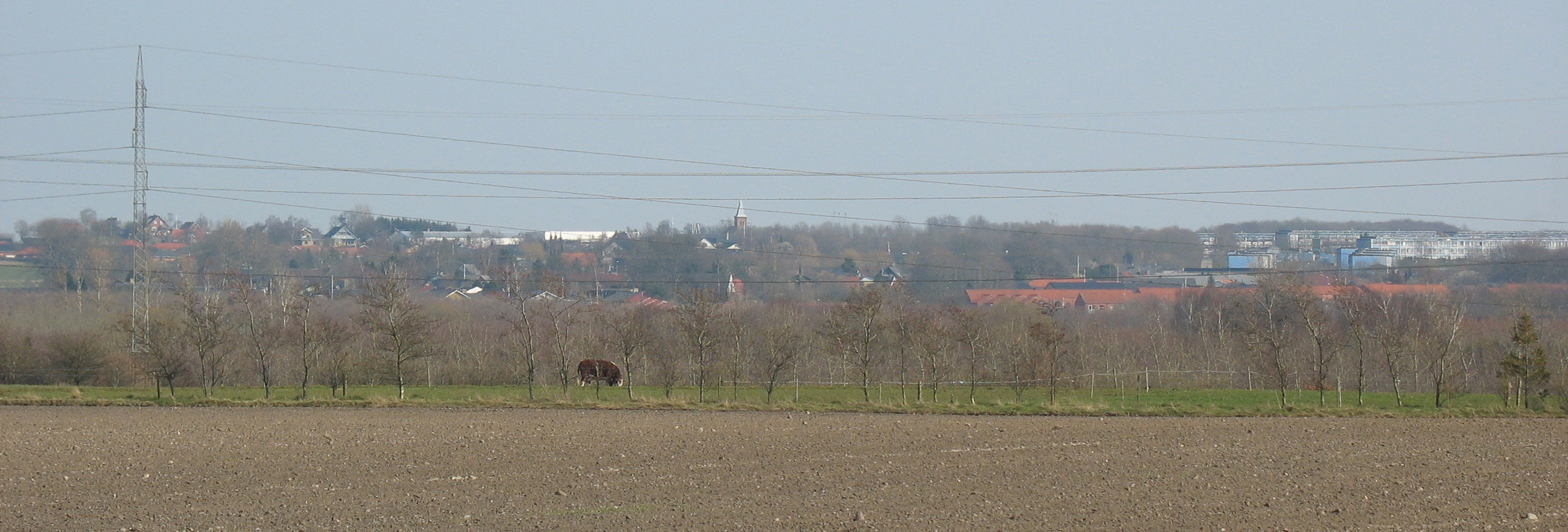 Trige - set fra vest